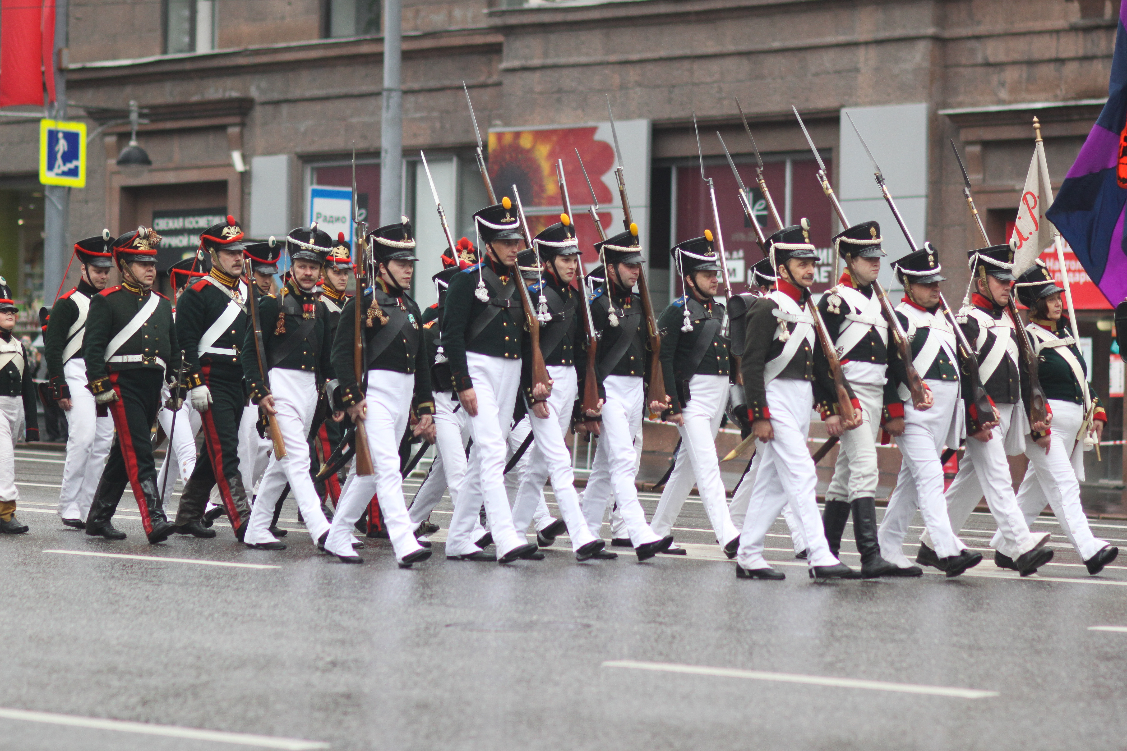 Парад в честь Дня России на Тверской улице